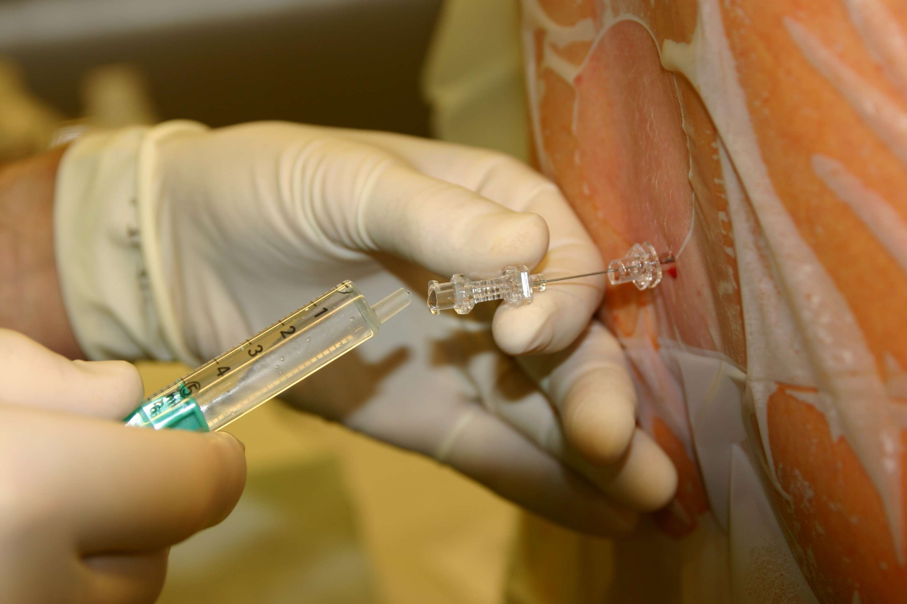 Liquorrückfluß durch 25 G Spinalnadel bei Spinalanaesthesie